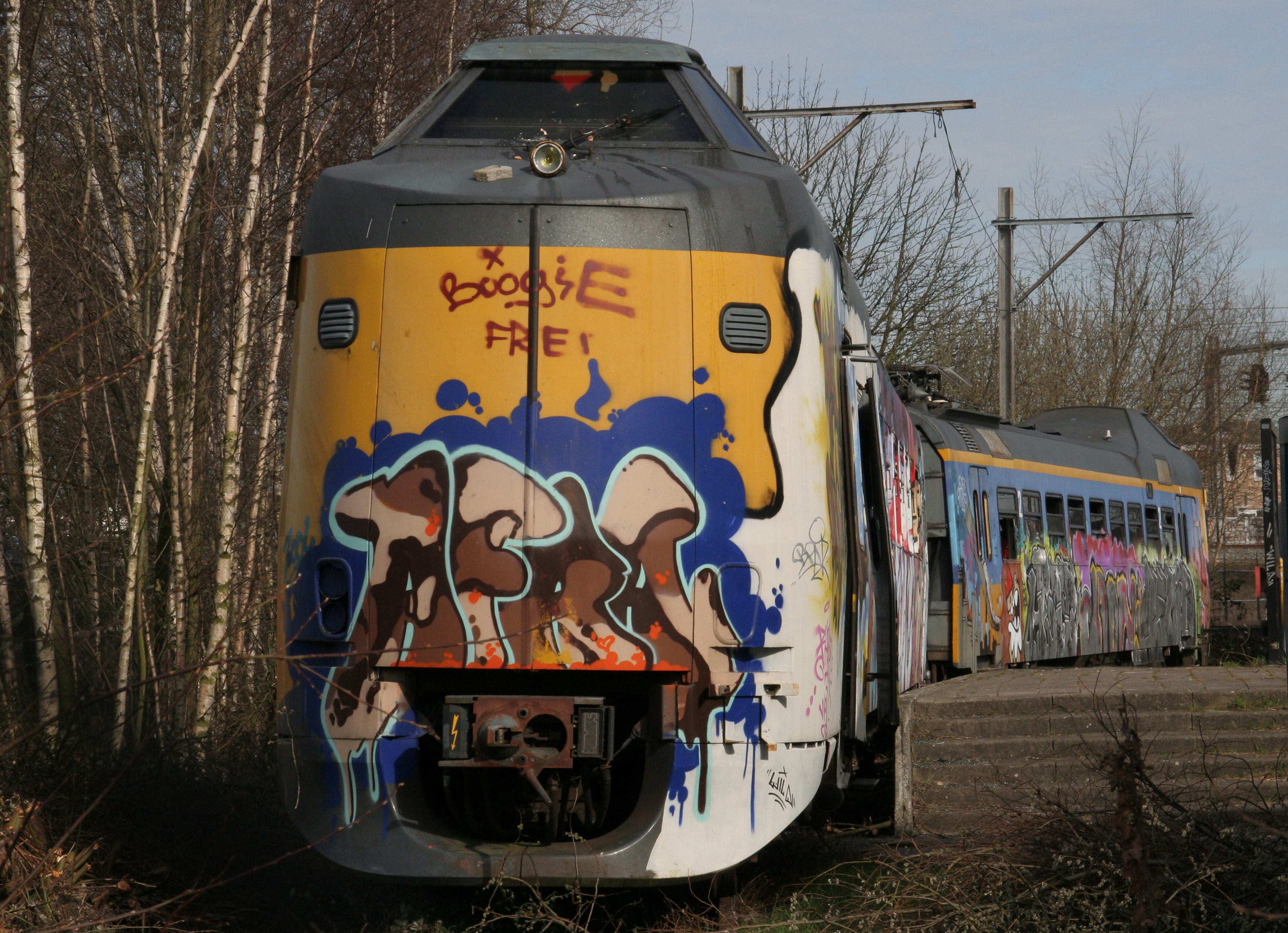 Koploper 4005 bij Stator in Utrecht